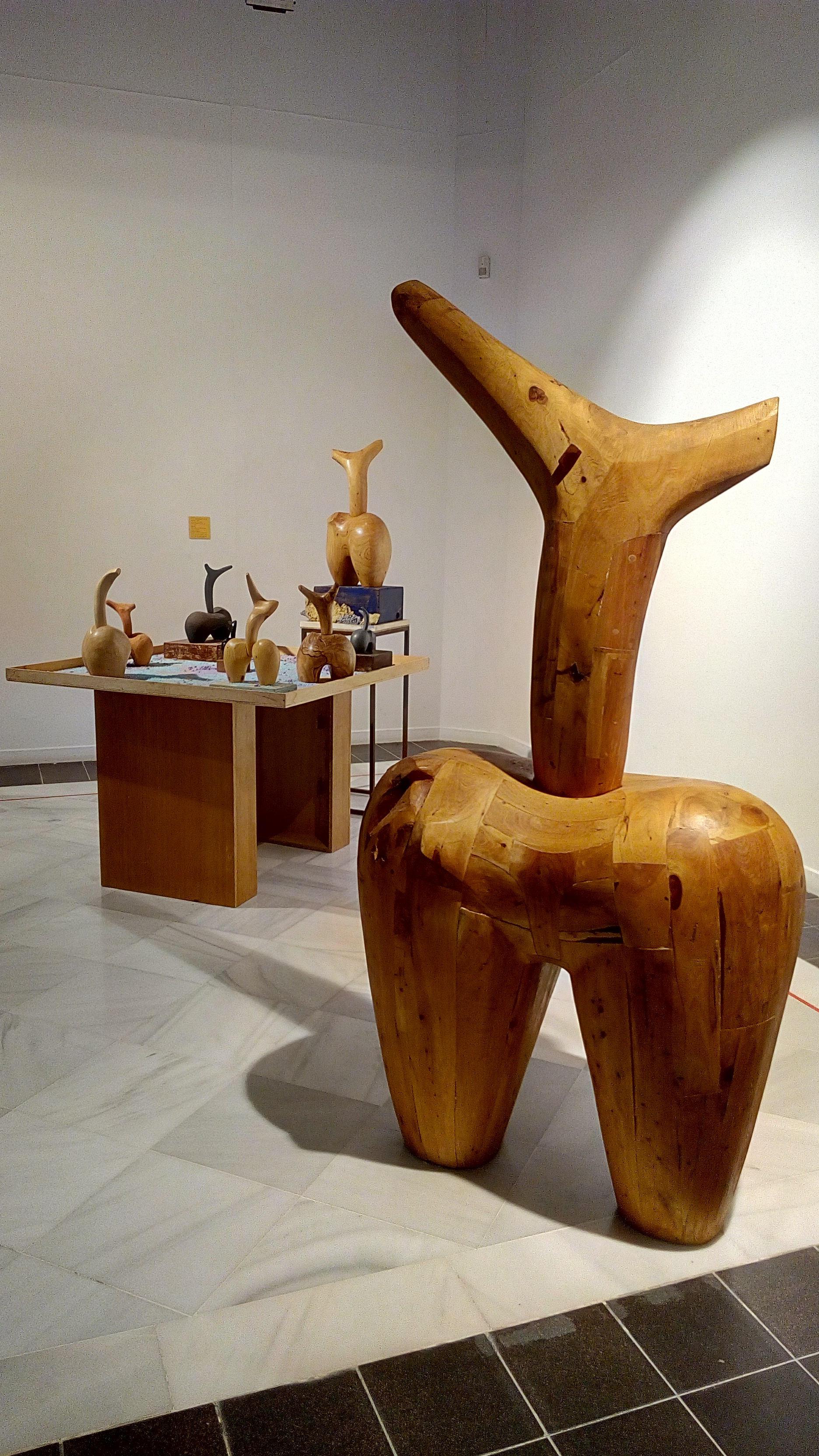 Esculturas en madera en la exposición Pulso Almado. Madrid, Parque del Retiro.